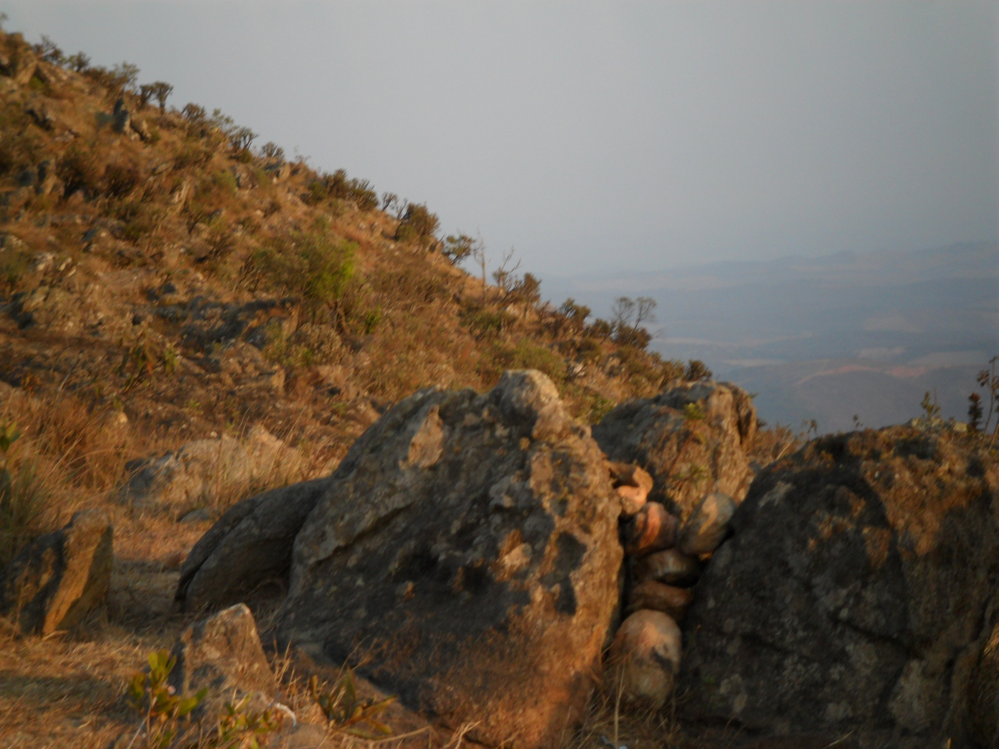 Campos rupestres na Serra de Ouro Branco (porção sul da Cadeia do Espinhaço)